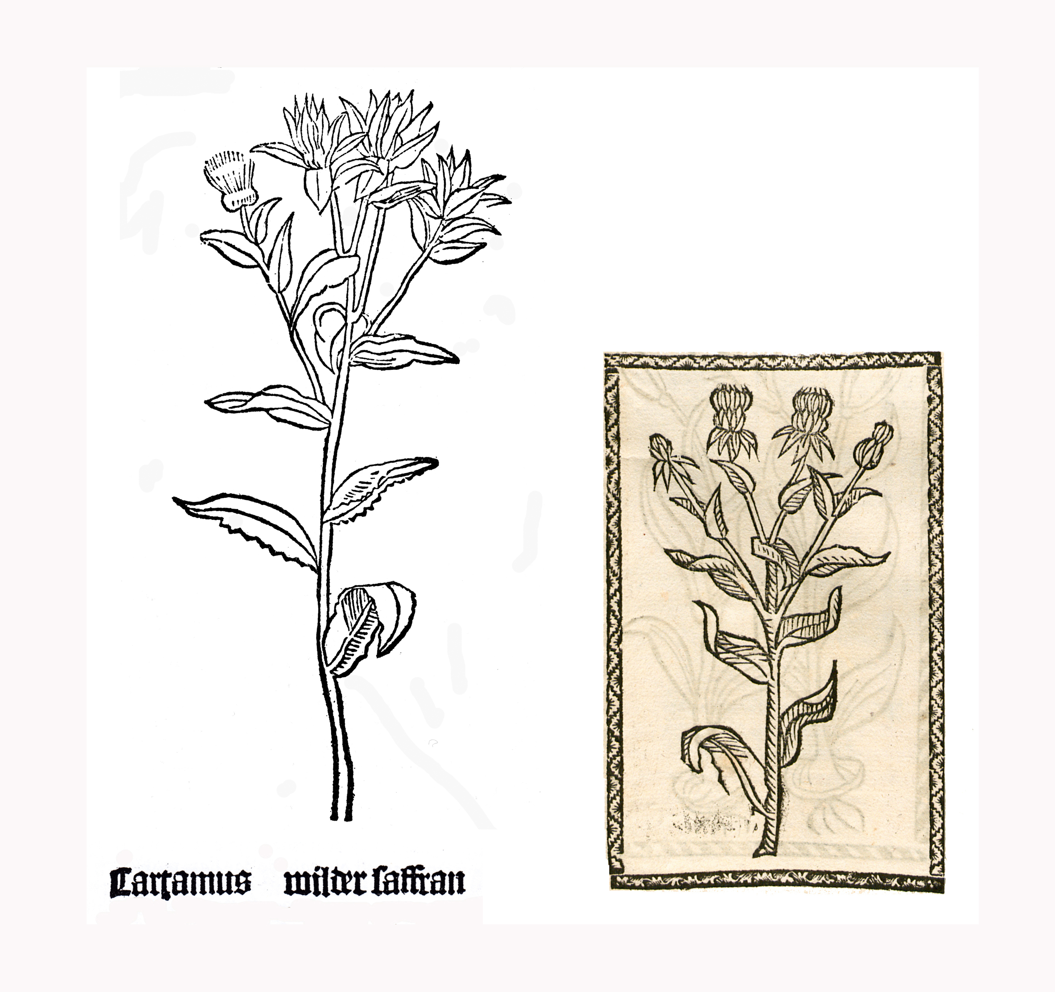 Abbildung von Wild Saffron (Carthamus tinctorius